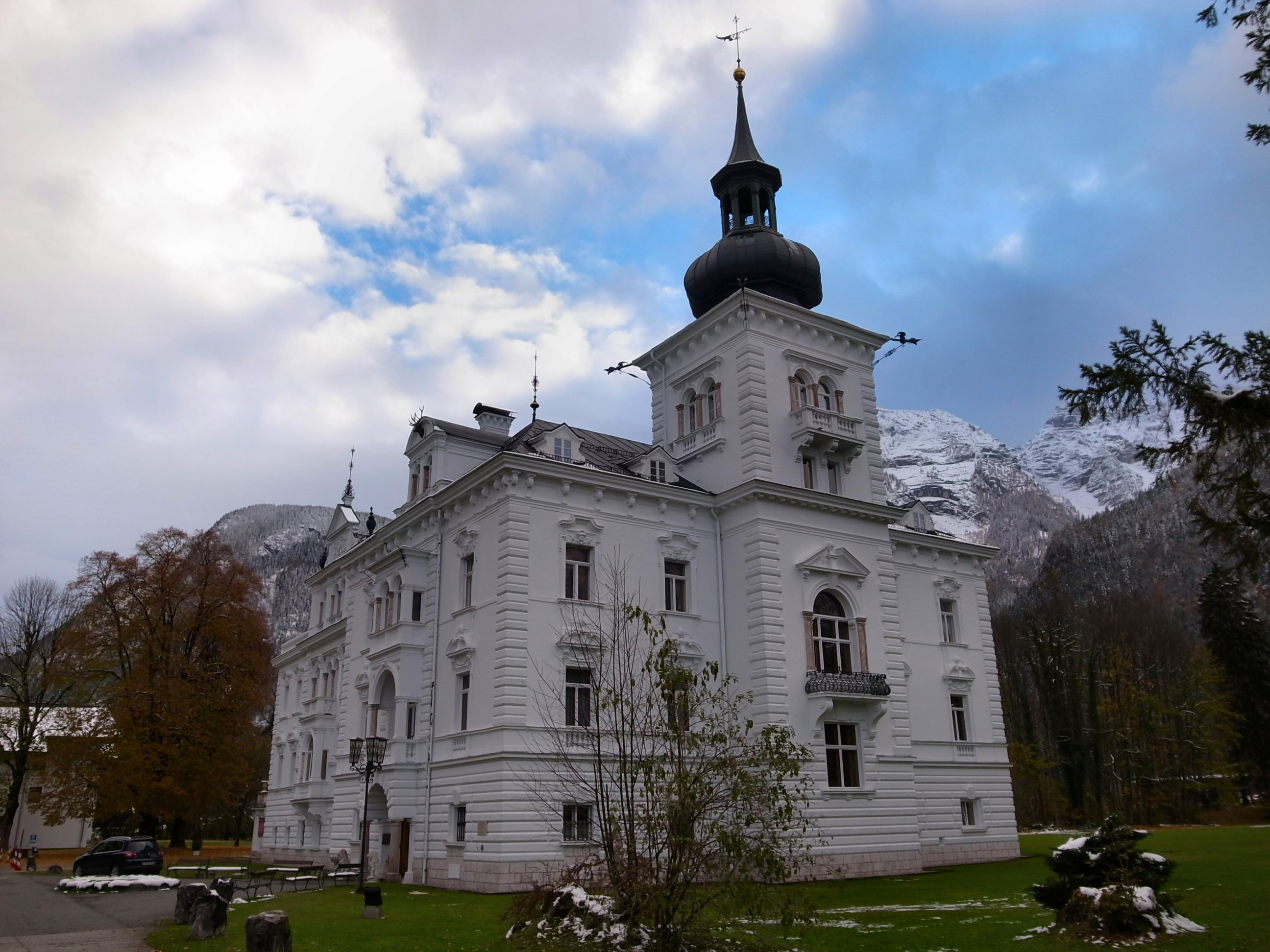 St. Martin b. Lofer,Schloss Grubhof,Geburtshaus von Anton Faistauer